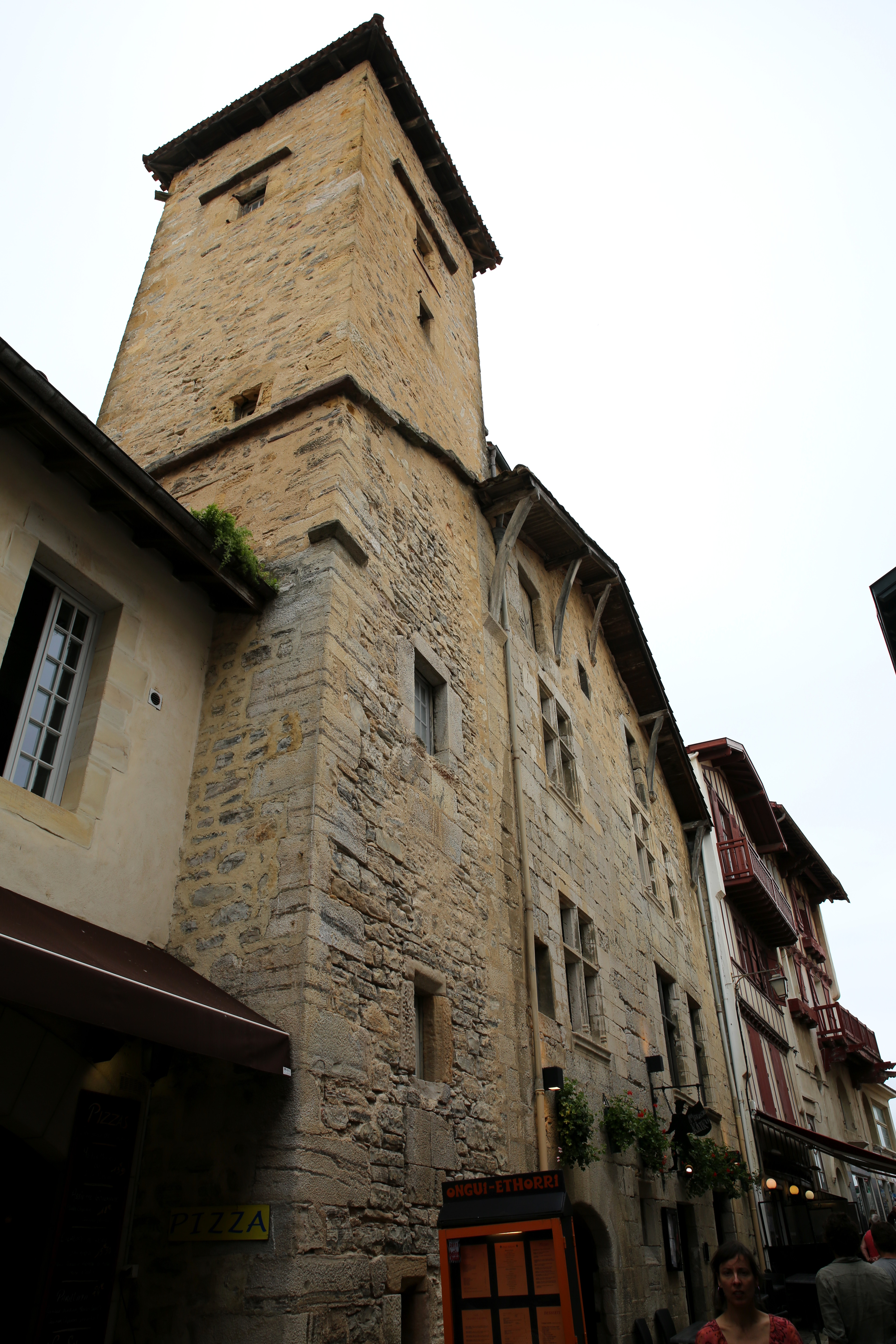 Maison Ezkerreneatour, escalier, porte cochère, élévation .